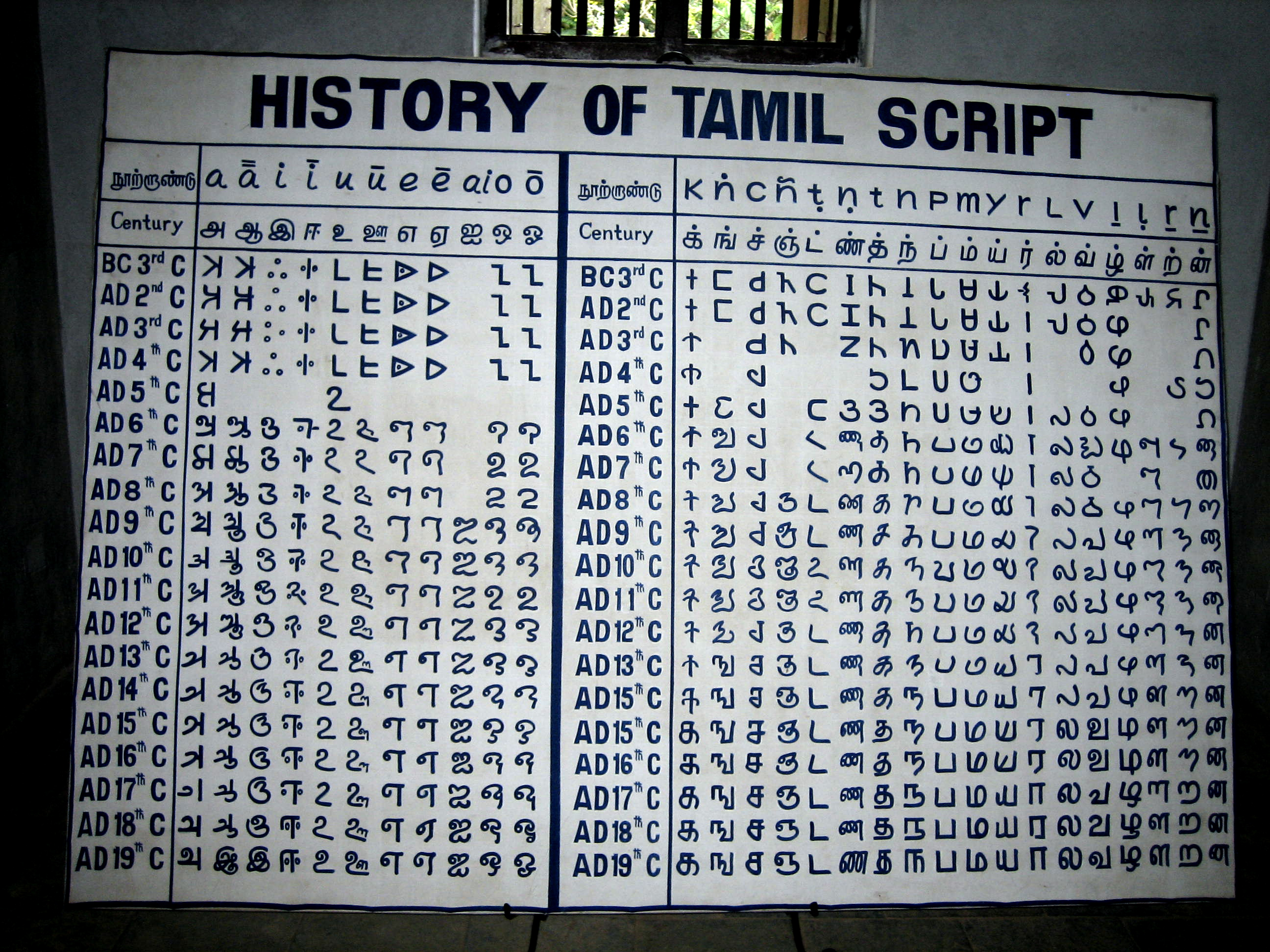 The original looks a lot like greek.